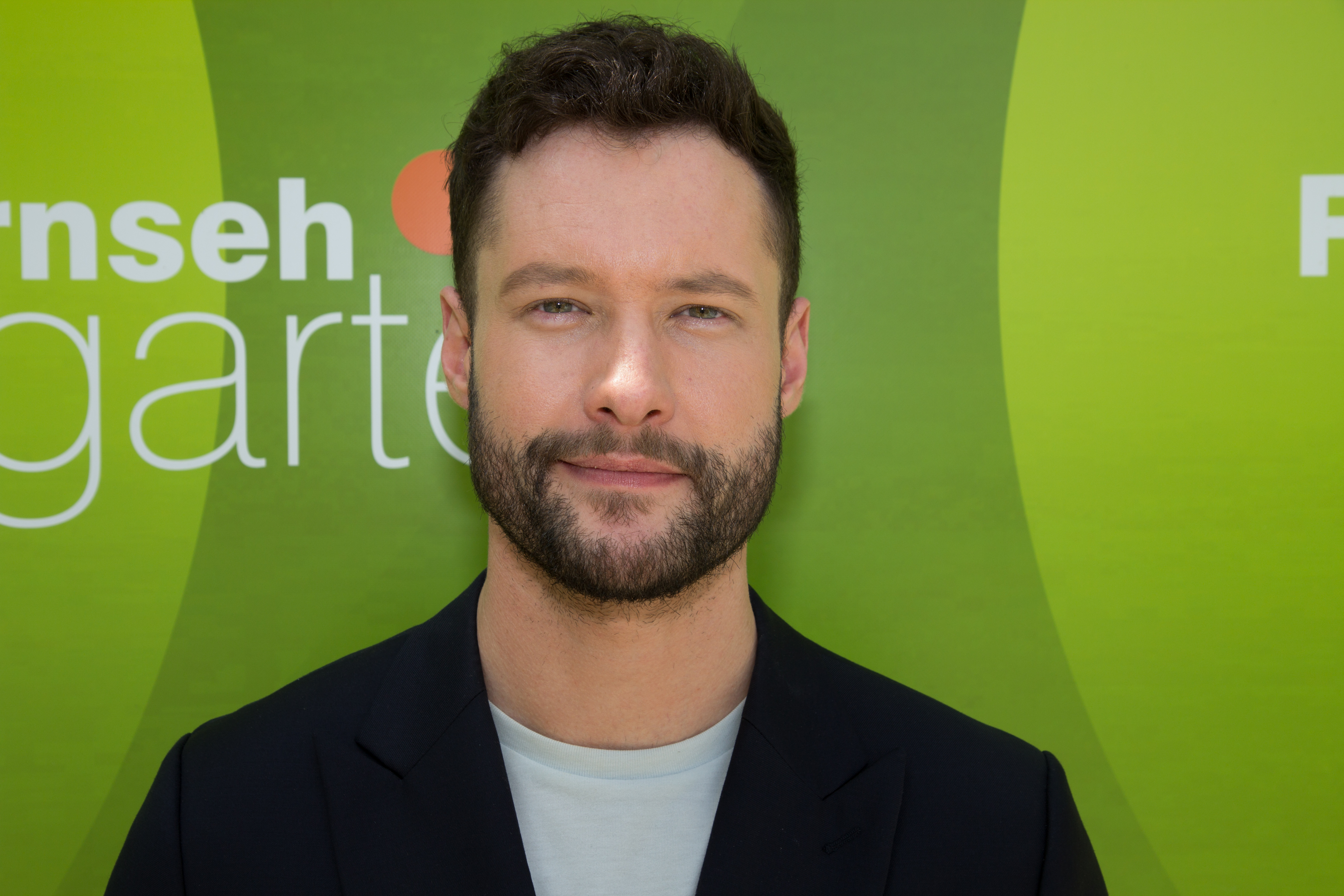 Calum Scott als Gast beim ZDF-Fernsehgarten am 21. Mai 2018 in Mainz.